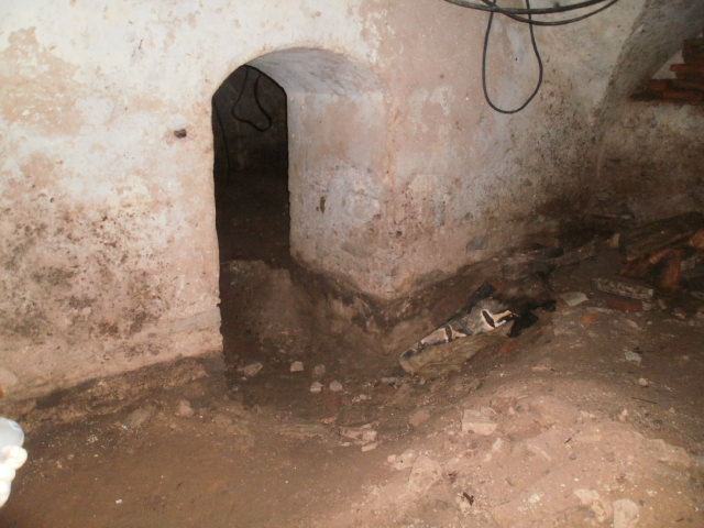 I ja II keldrikorruse põhjapoolse ruumi ukseava. Ukseava jätkub sügavamal, on näha et põrandapinda on u. vähemalt 40 cm tõstetud.